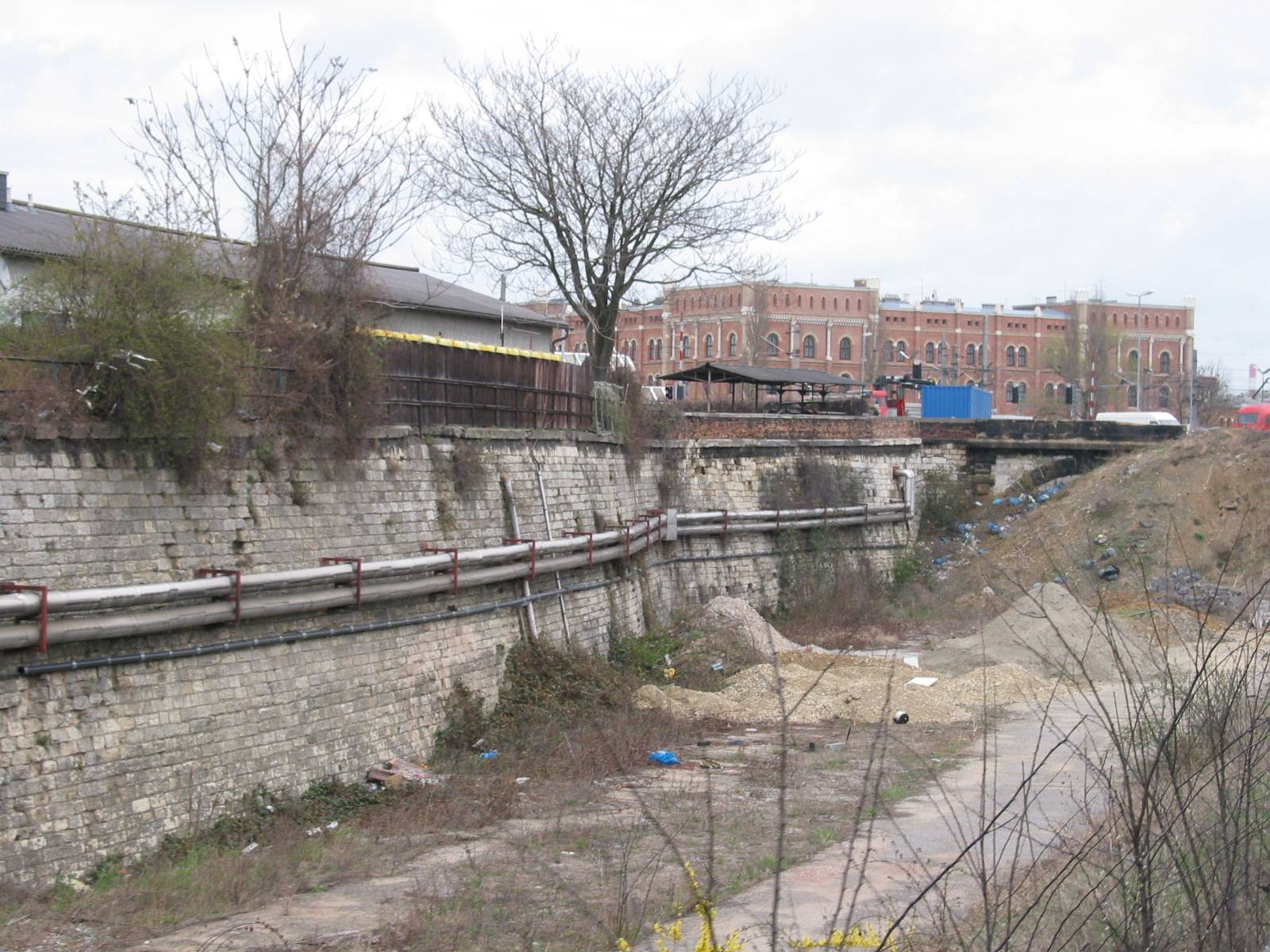 Arsenaltunnel, vermauert